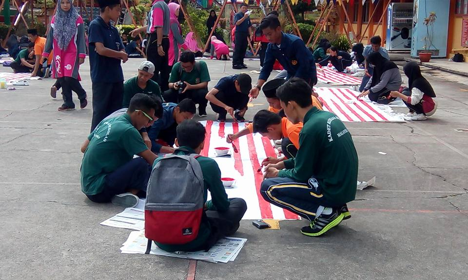 Mewarna Jalur Gemilang 4